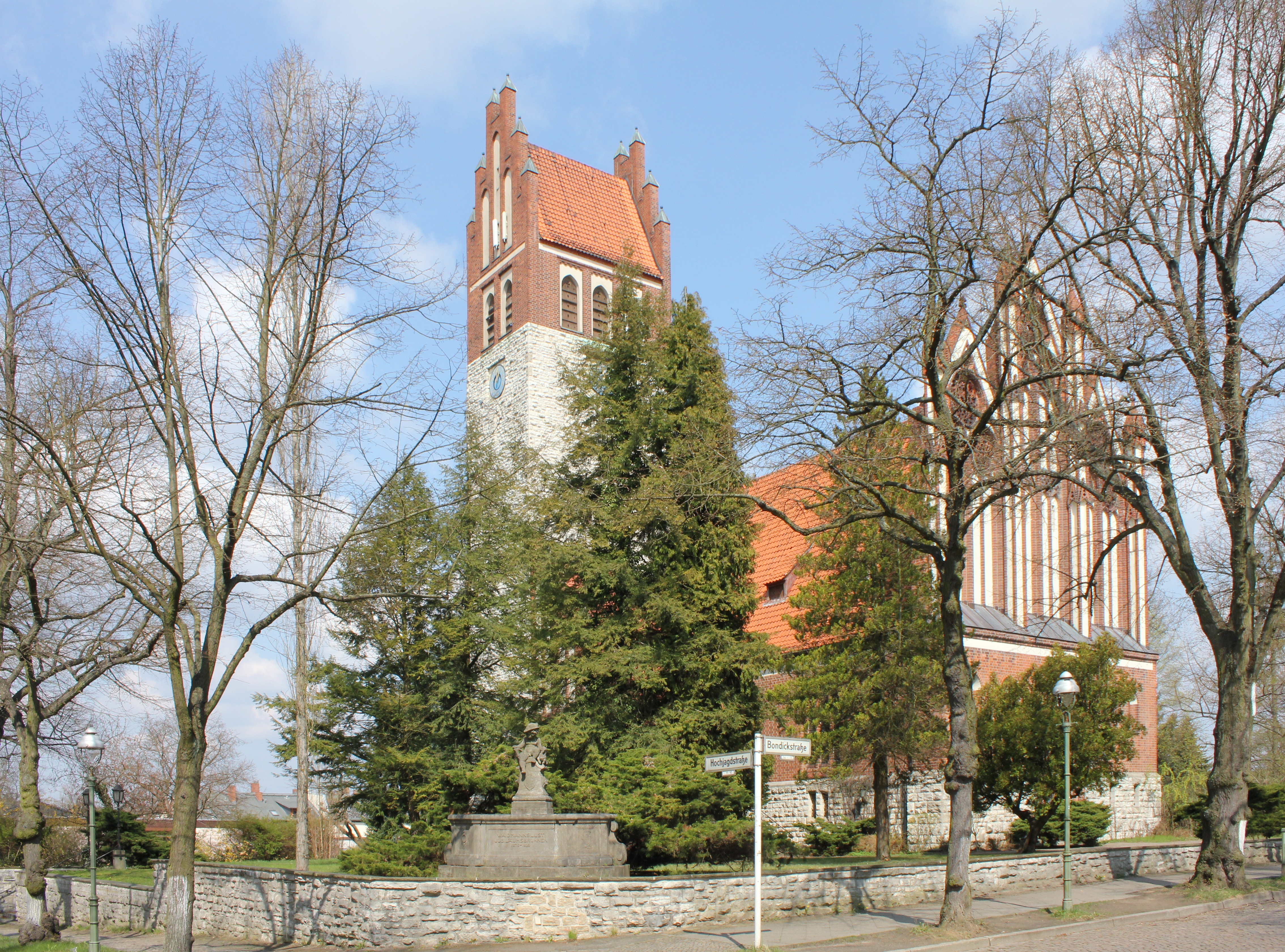 Evangelische Königin-Luise-Kirche